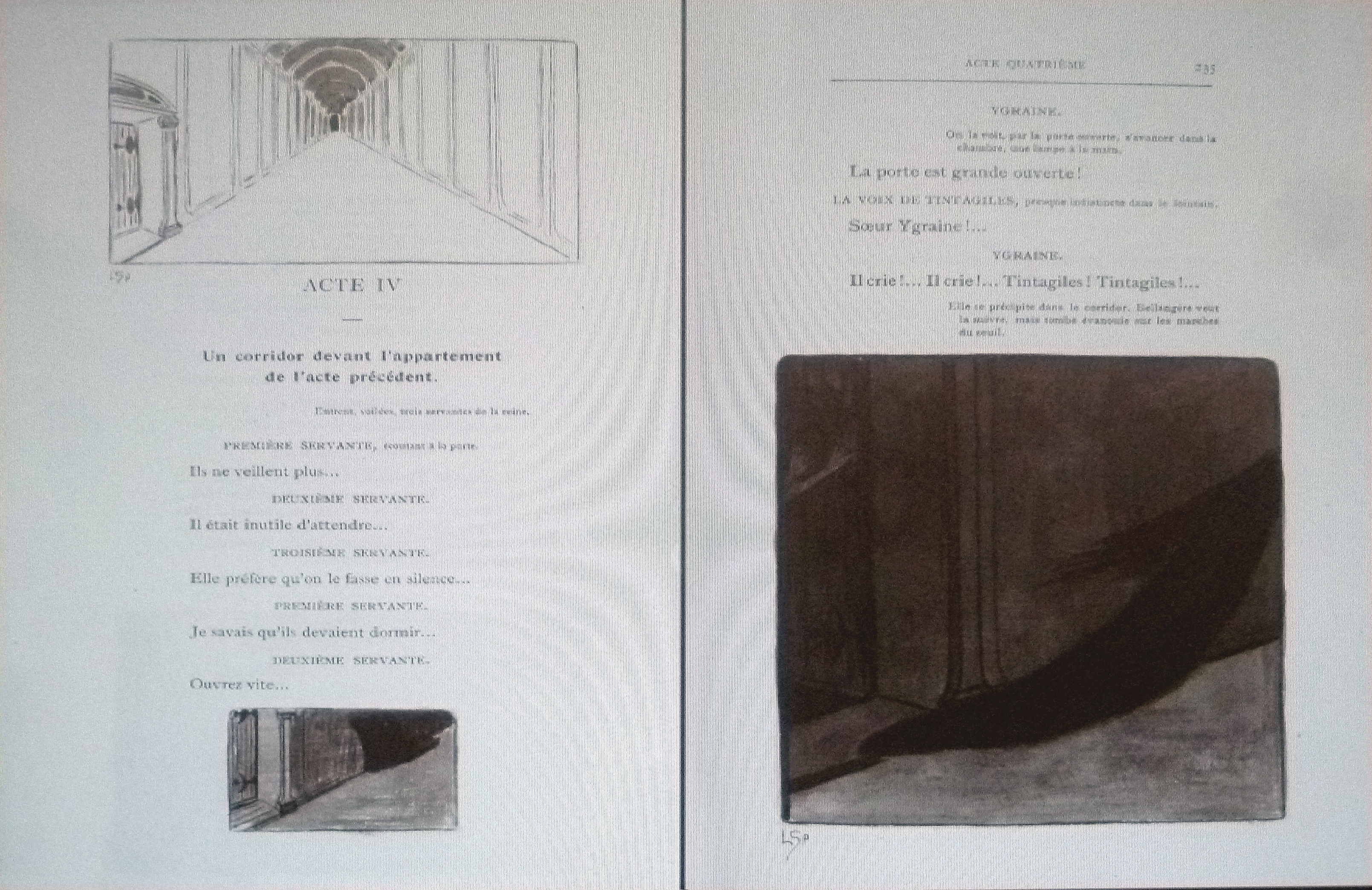 "La Mort de Tintagiles" - Théâtre (Maeterlinck); links: "Rondsluipende vrouwen in de gang"; rechts: "Vluchtende schim"; illustraties door Léon Spilliaert (1903); privébezit